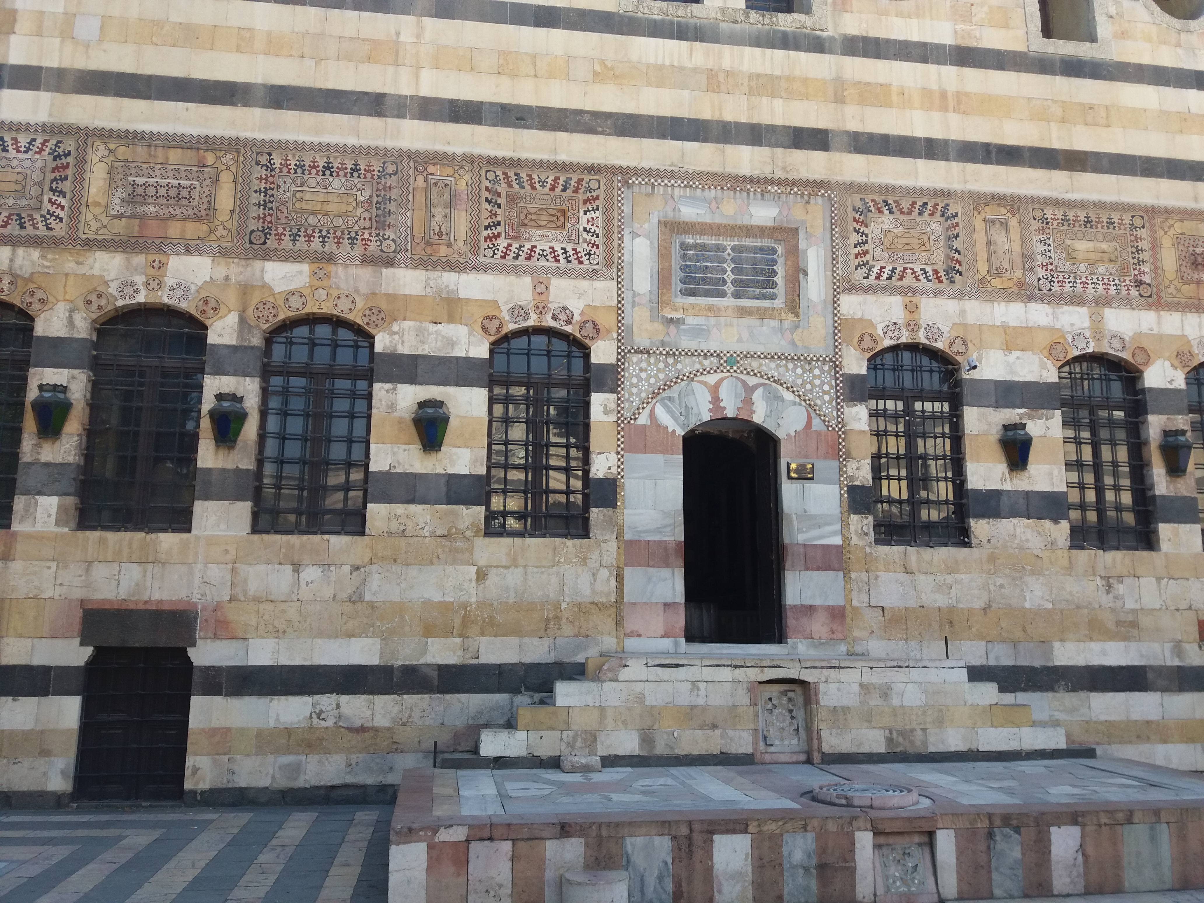 القاعة الكبيرة في السلملك وهي المكان المخصص لأستقبال العامة والخاصة من وكلاء رب البيت وضيوفه